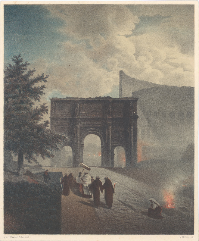 Vor dem Kolosseum, Gemalt von Oswald Achenbach. M. Ulffers lithographiert. – Farblithographie. Höhe: 19,3 cm x Breite: 15 cm.